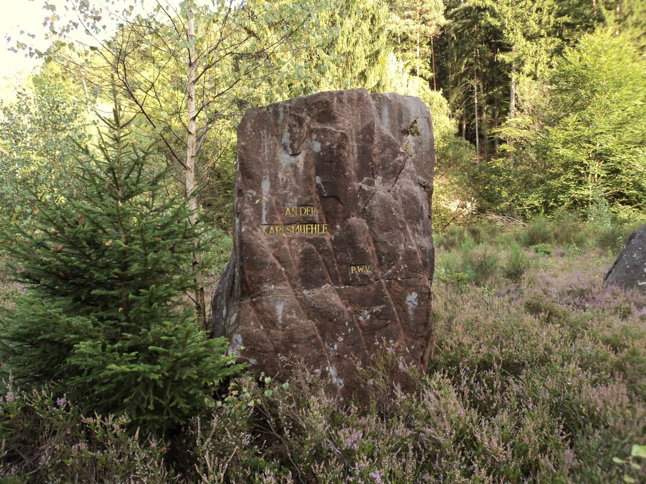 Ritterstein Nummer 231, An der Karlsmühle